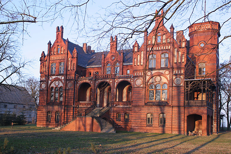 Pałac w Chorzeminie